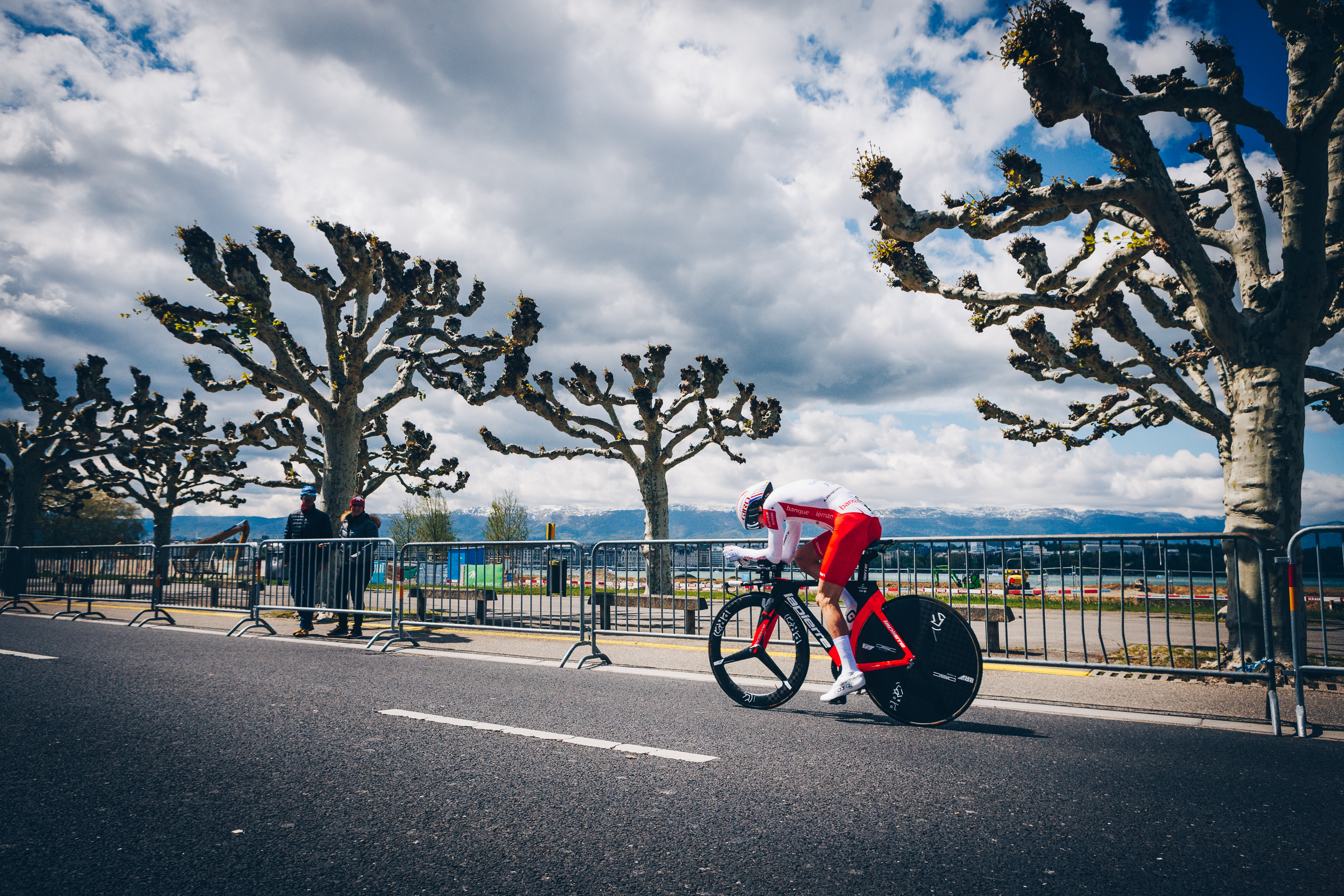 David Gaudu auf der 5. Etappe der Tour de Romandie 2019 in Genf